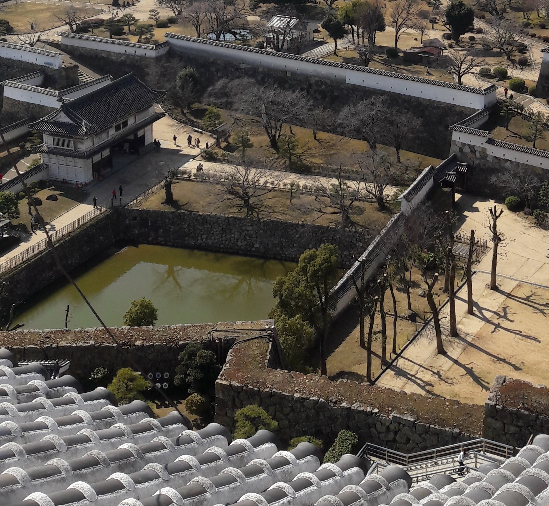 Réservoir d'eau du château de Himeji, vu depuis le donjon, version découpée